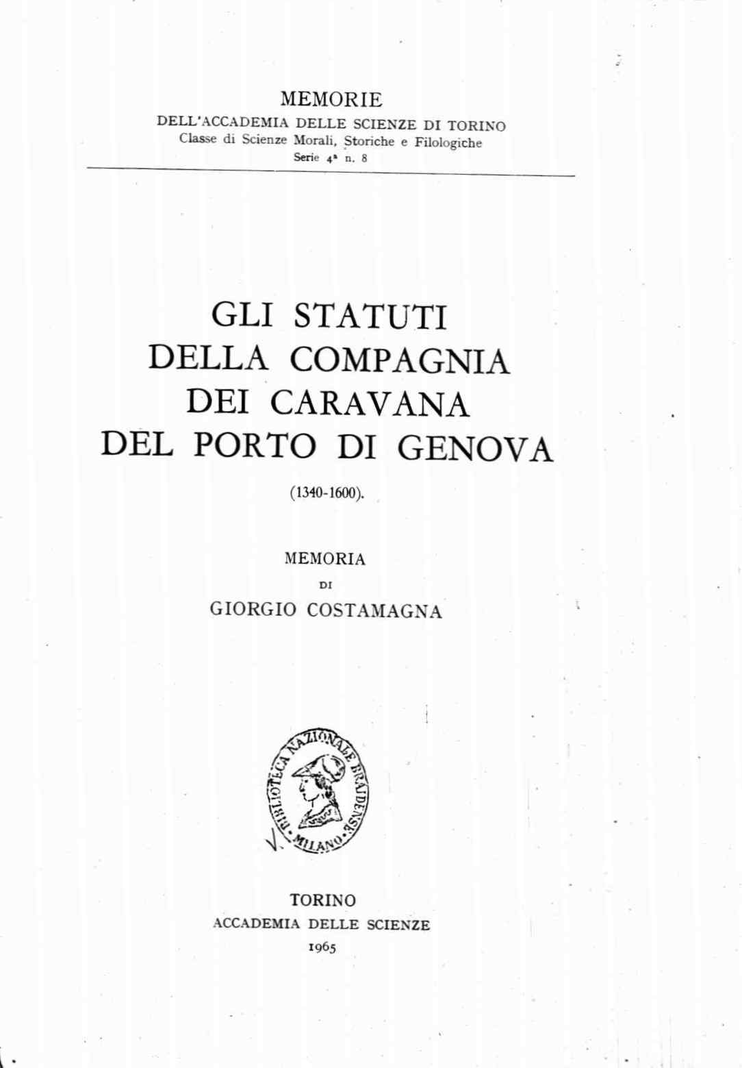 Frontespizio